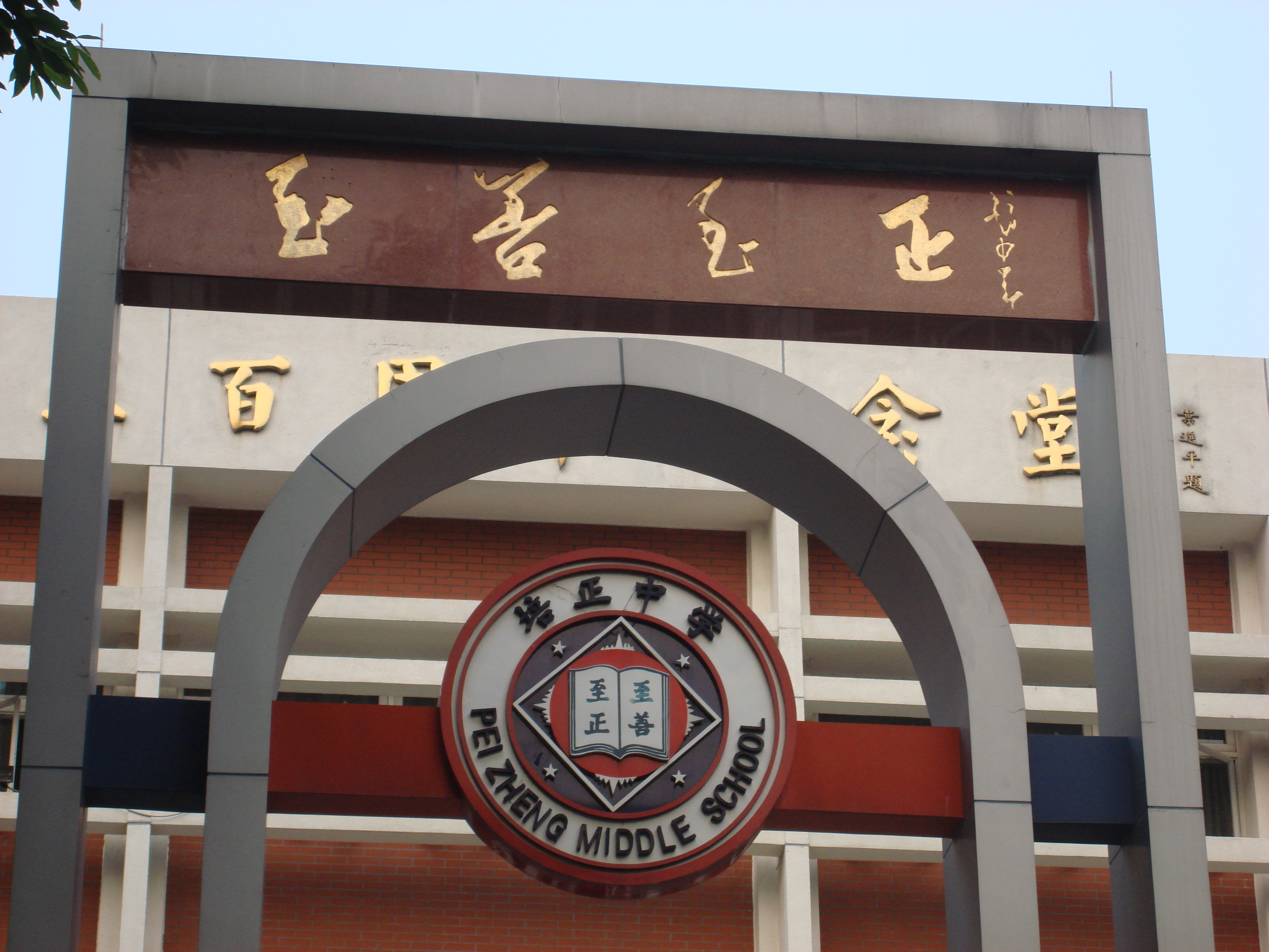 廣州培正中學漢語拼音校徽「Pei Zheng」，現在已改回中共建政前使用的「Pui Ching」。